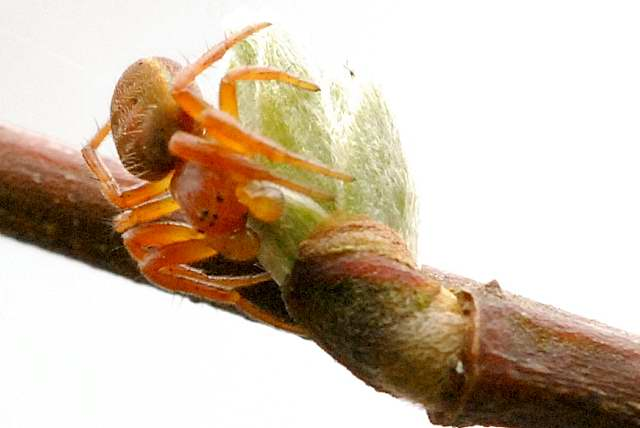 Araniella sp. from Commanster, Belgian High Ardennes .